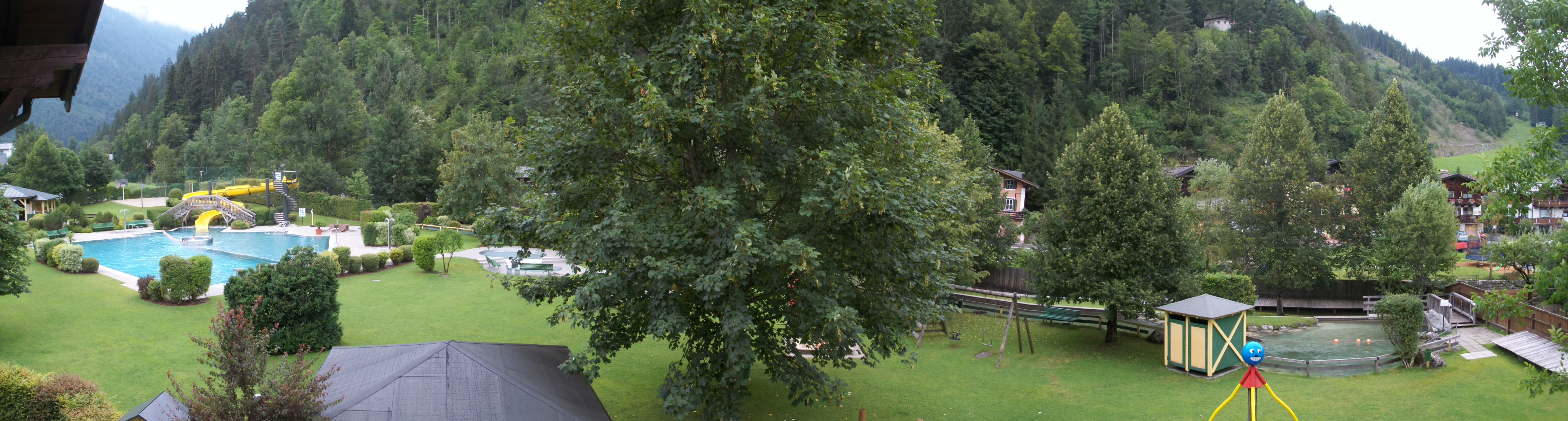 Blick auf Steinbergbad; Lofer; Freibad